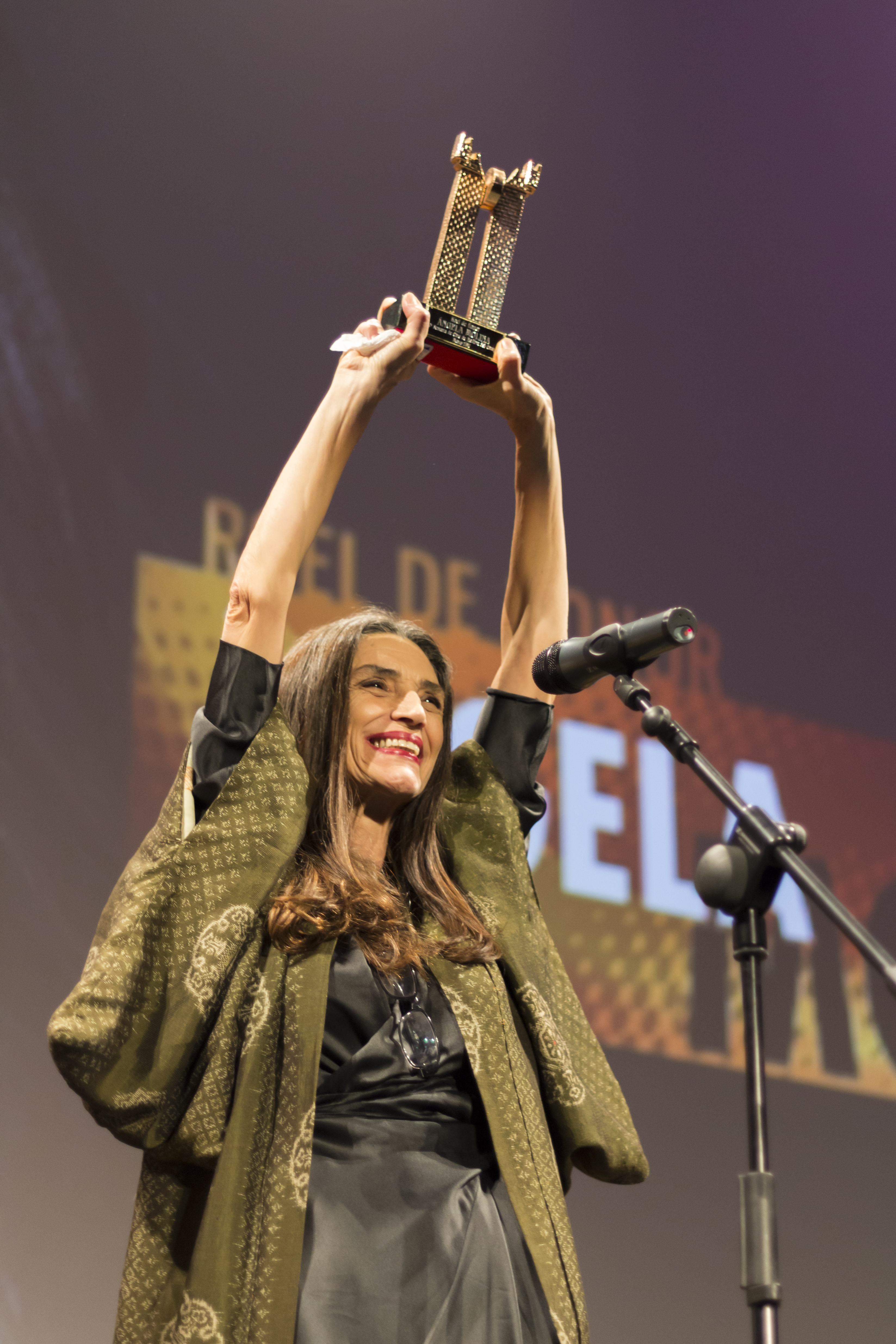 Ángela Molina en la 30 Semana de Cine de Medina del Campo, recogiendo el Roel de honor